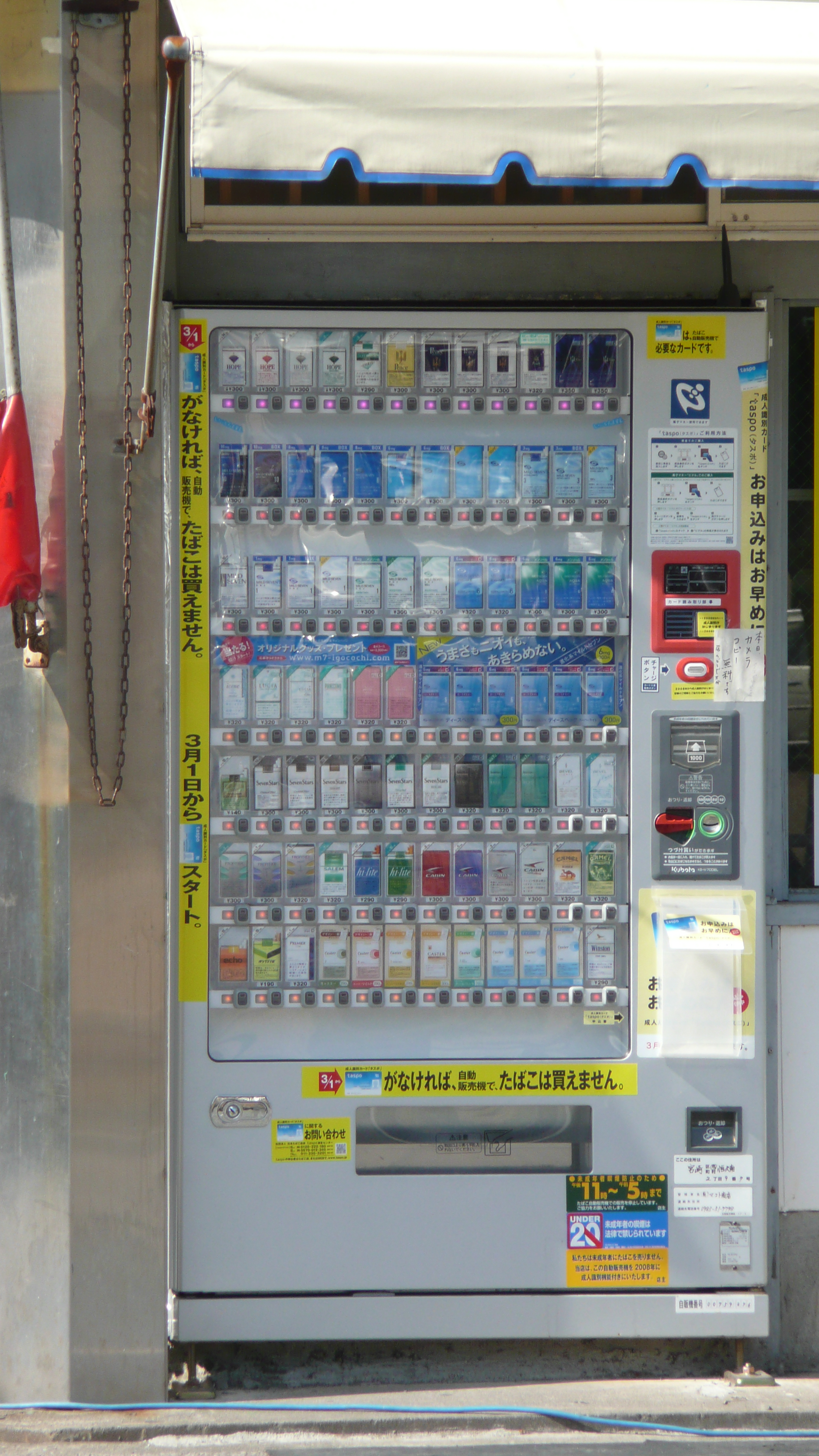 taspo Vending machine 宮崎市恒久南2丁目に設置されていたtaspo対応の成人識別自動販売機。投稿者が市営公園から撮影。